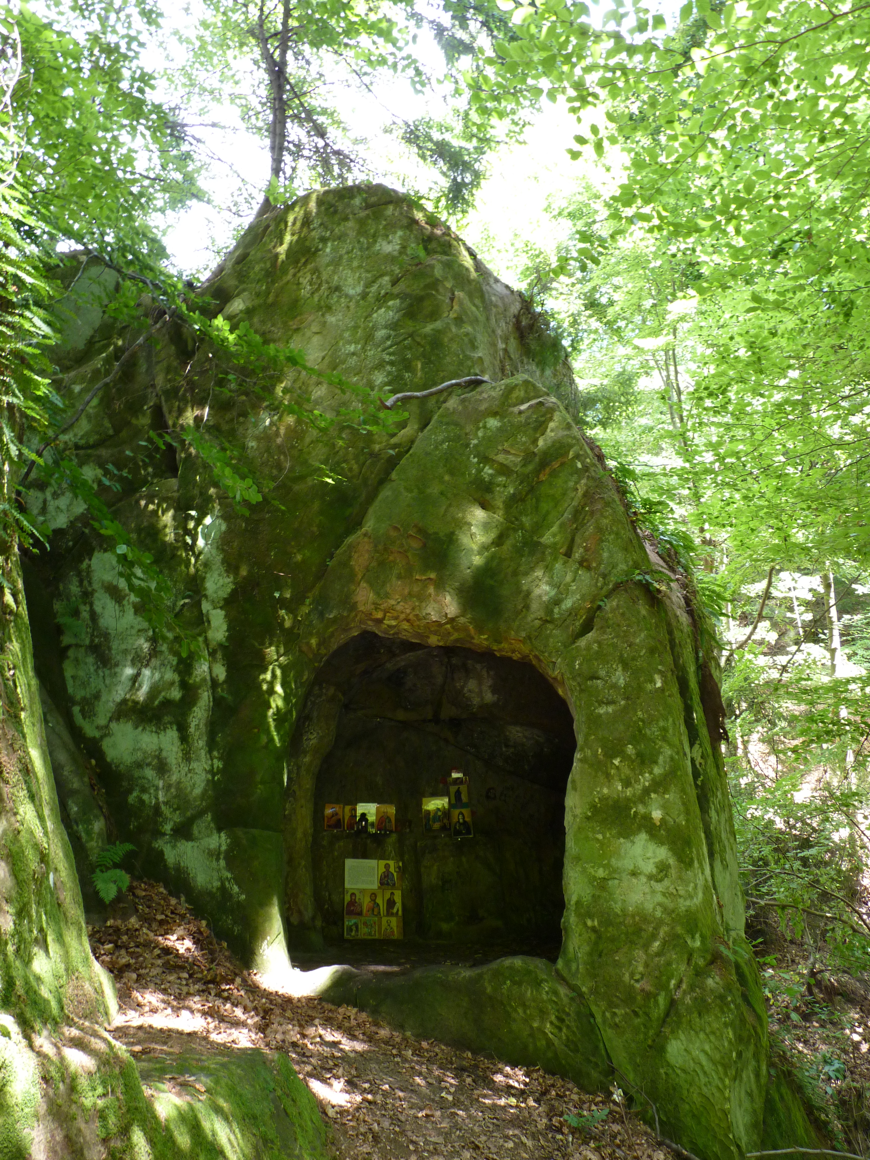 Piatra Ingaurita